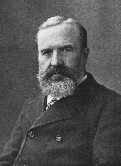 Peter Klason (1848-1937)